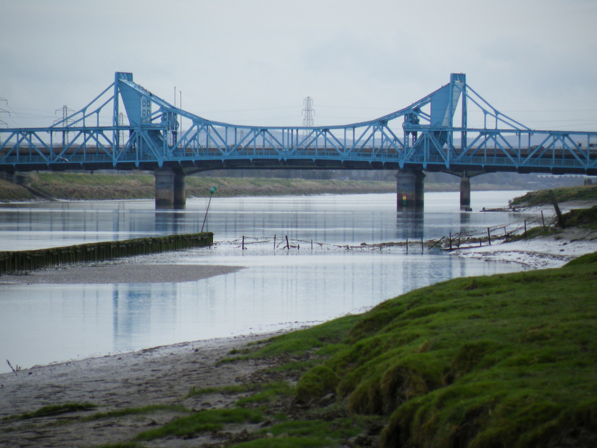 yr hen bont